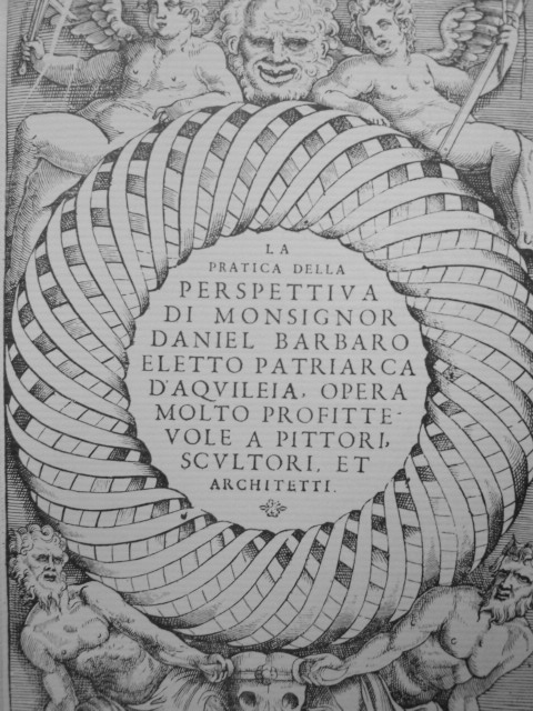 Daniele Barbaro La pratica della perspettiva, (1569), frontpaĝo